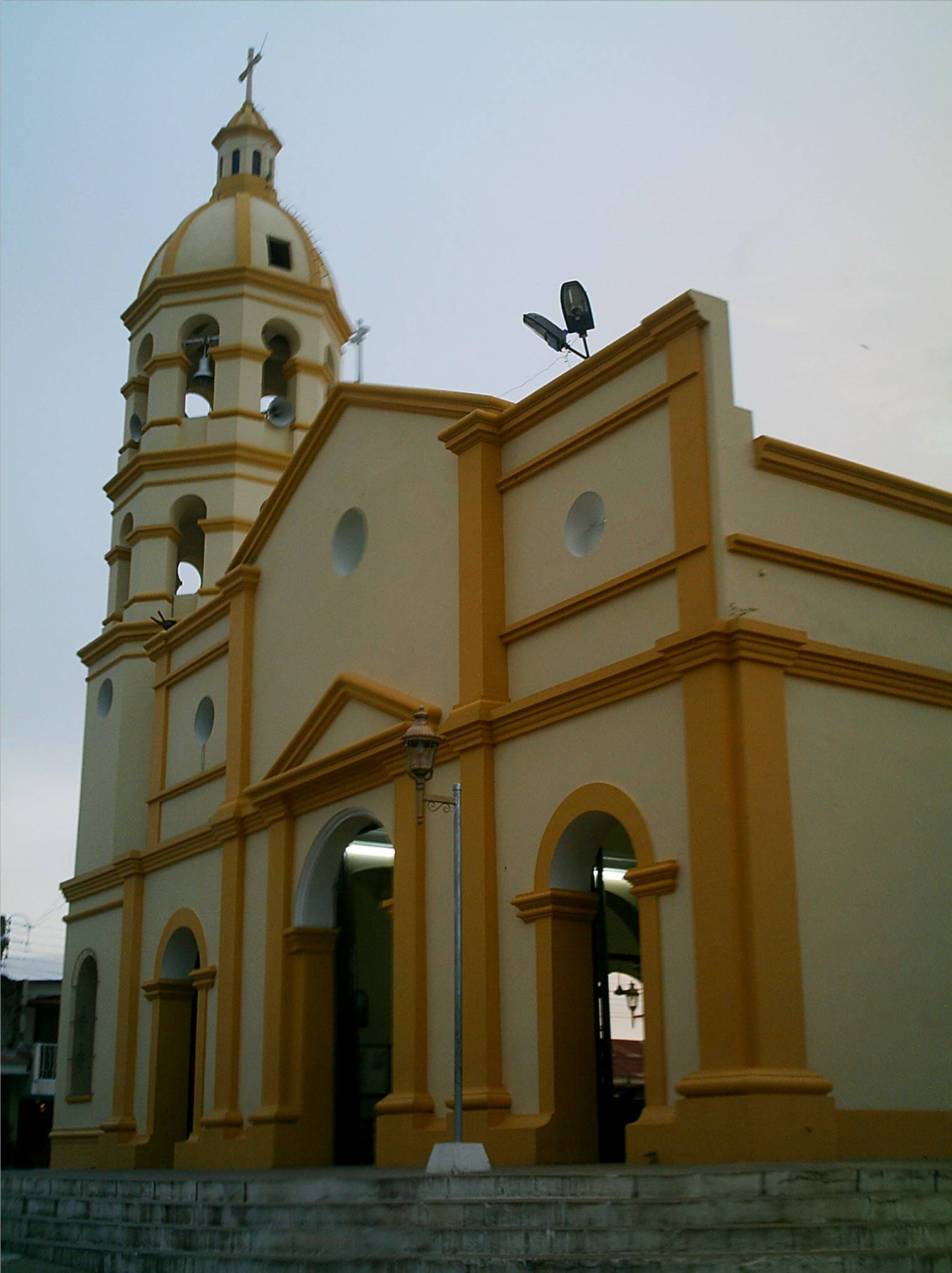 Fachada de La catedral de Nuestra Señora de La Candelaria